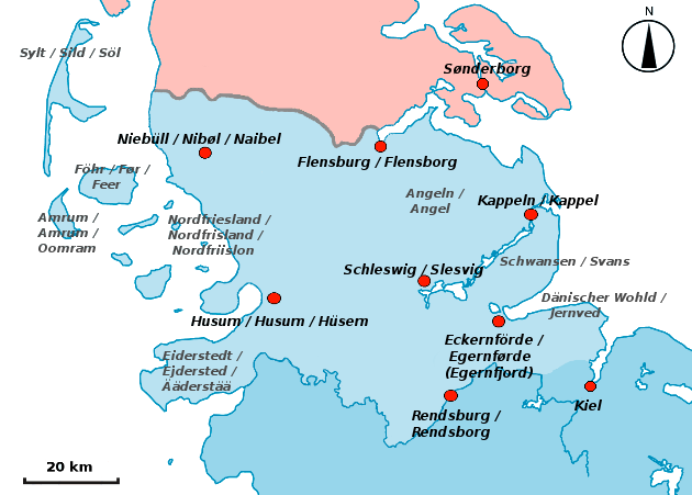 Karte über Südschleswig mit deutschen, dänischen und (an der Nordseeküste) nordfriesischen Landschafts- und Ortsbezeichnungen auf Grundlage der Karte Sydslesvig.png und des Ortsnamenregisters Slesvignavne.dk